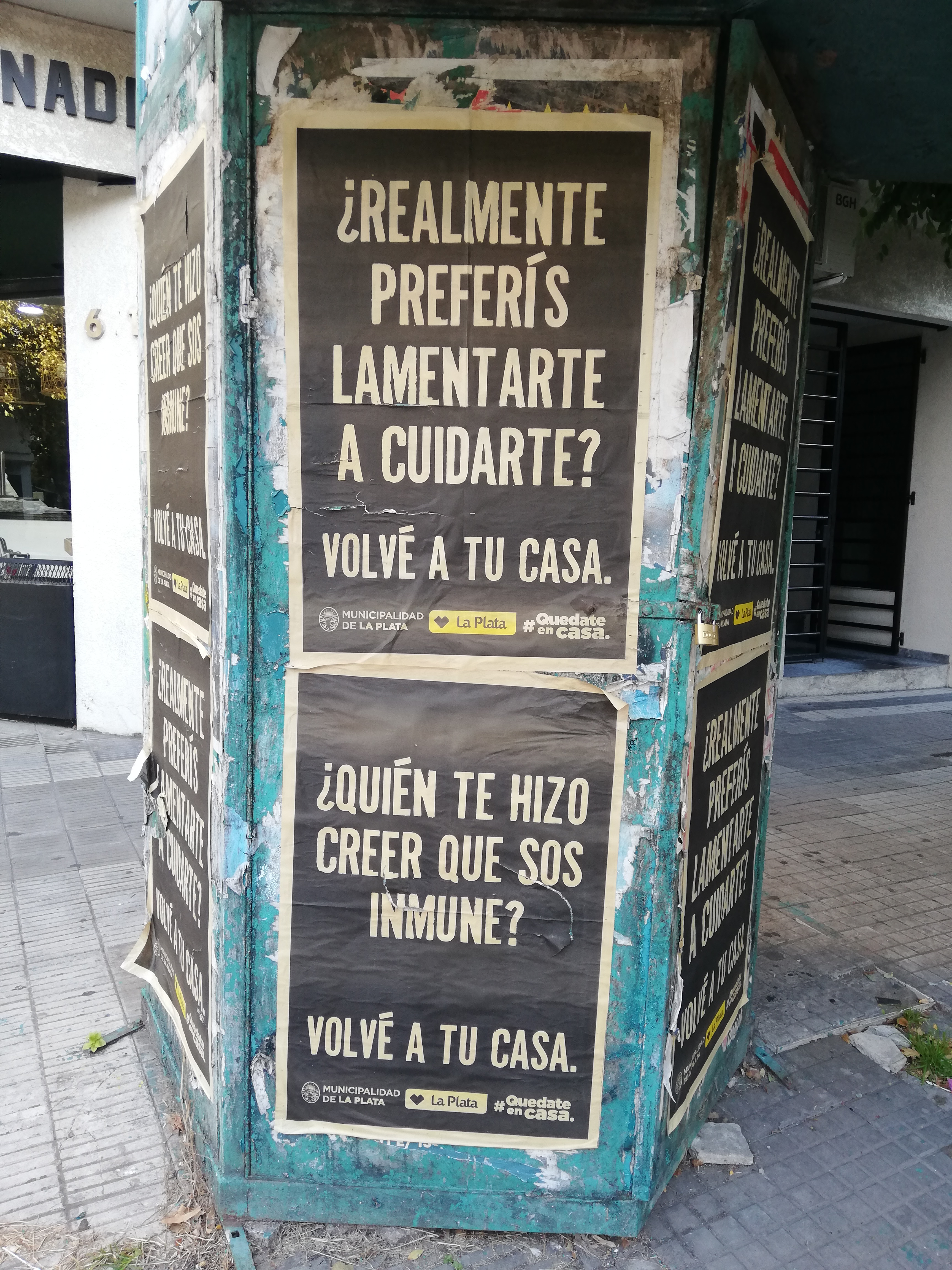 Afiches de la Municipalidad de La Plata (Argentina) instando a la población a respetar la cuarentena y permanecer en sus casas por la pandemia del Covid 19